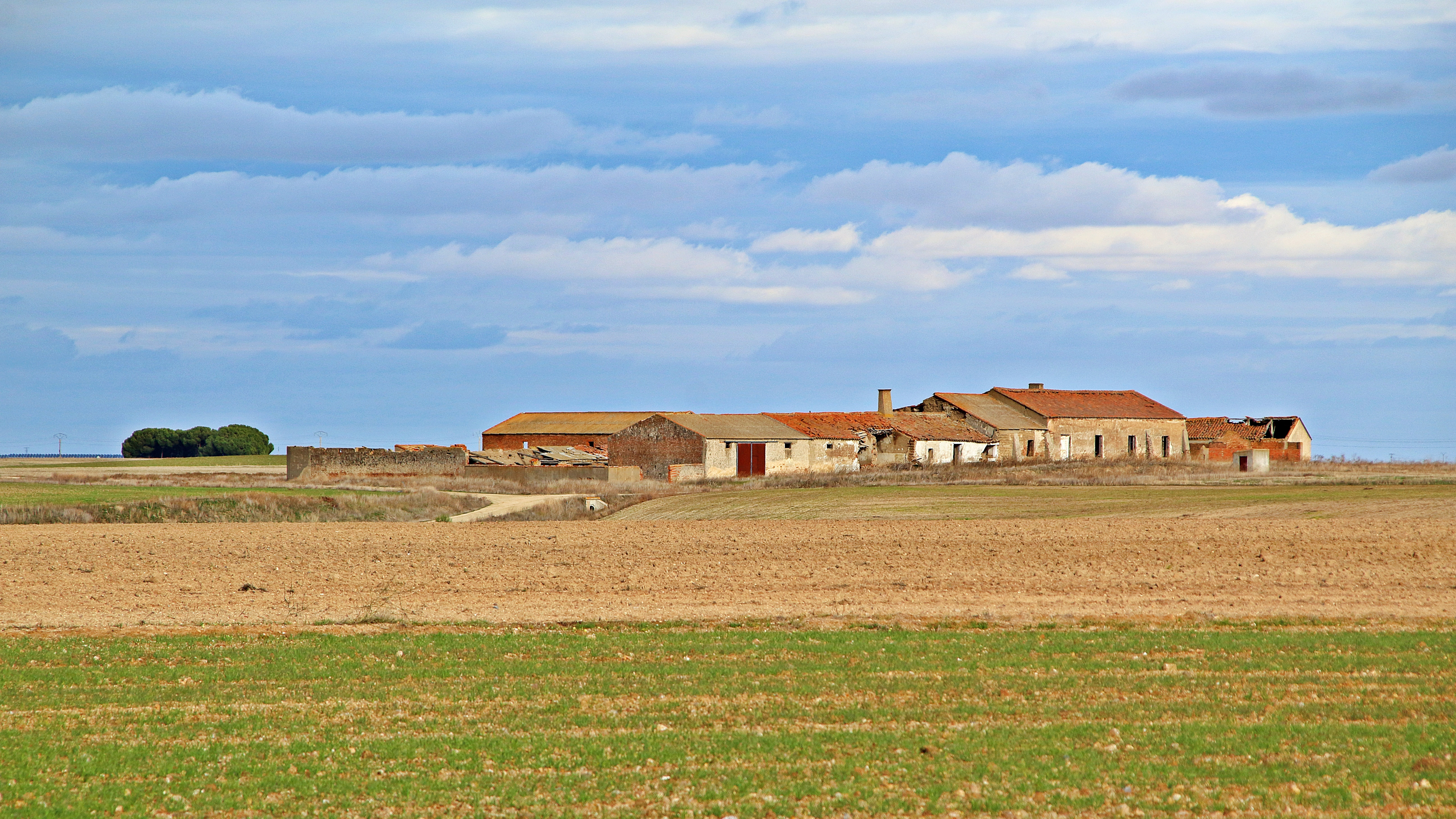 Aldeayuste, despoblado del municipio El Campo de Peñaranda, comarca Tierras de Peñaranda, provincia de Salamanca.